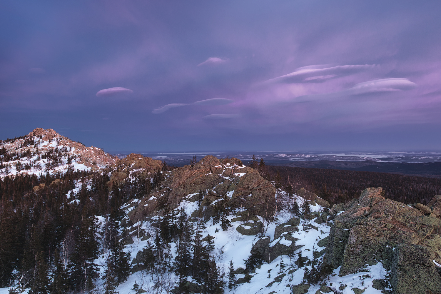 Вершина горы Ицыл: Златоуст, Челябинская область This image is related to the protected area of Russia number 7410094